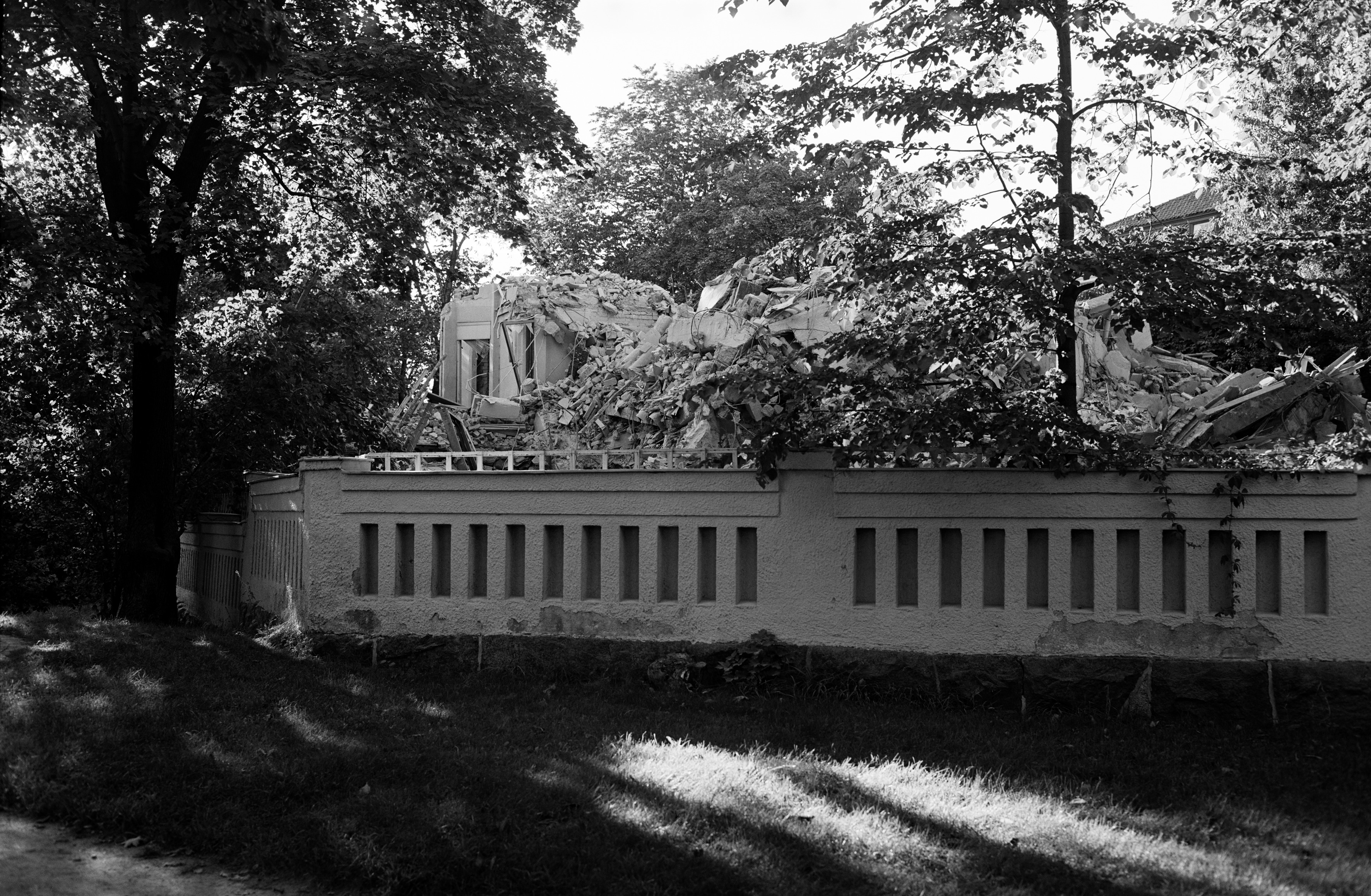 Purkutyömaa Britannian suurlähetystön tontilla. Villa Baumgartner. Itäinen Puistotie 8 c.